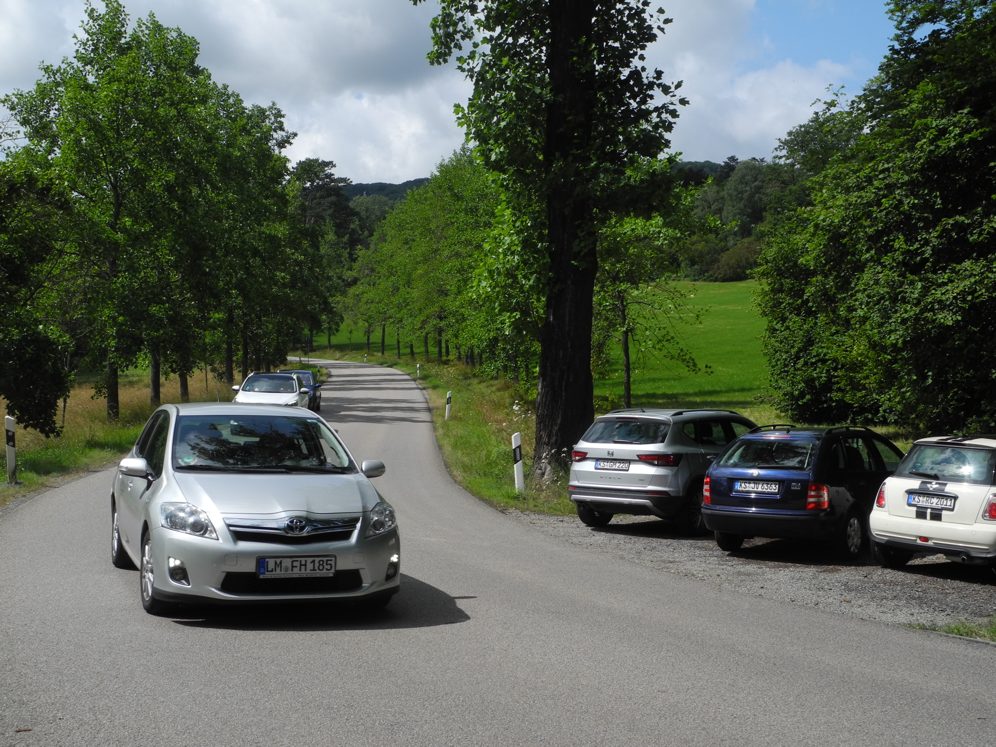 Die Tulpenallee im Bergpark Wilhelmshöhe in Kassel, Hessen, Deutschland. Kfz-Verkehr und zugeparkter Fußweg in der Kehre südwestlich der Waldschule.